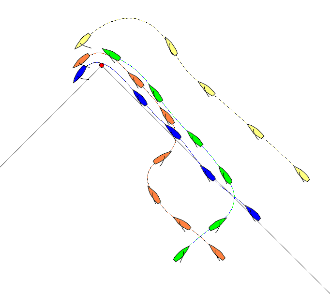 Situazione di regata: la boa è indicata in rosso, le lay line in nero. La barca blu, essendosi portata sulla lay line, effettua un percorso più corto rispetto alle altre imbarcazioni. Si tratta della rotta teoricamente migliore, ma generalmente impossibile a causa dei giri di vento. Le altre rotte, più realistiche, seguono tali cambiamenti (barca arancione) oppure li prevengono (barca gialla, che si è allontanata troppo, e barca verde, rotta migliore).